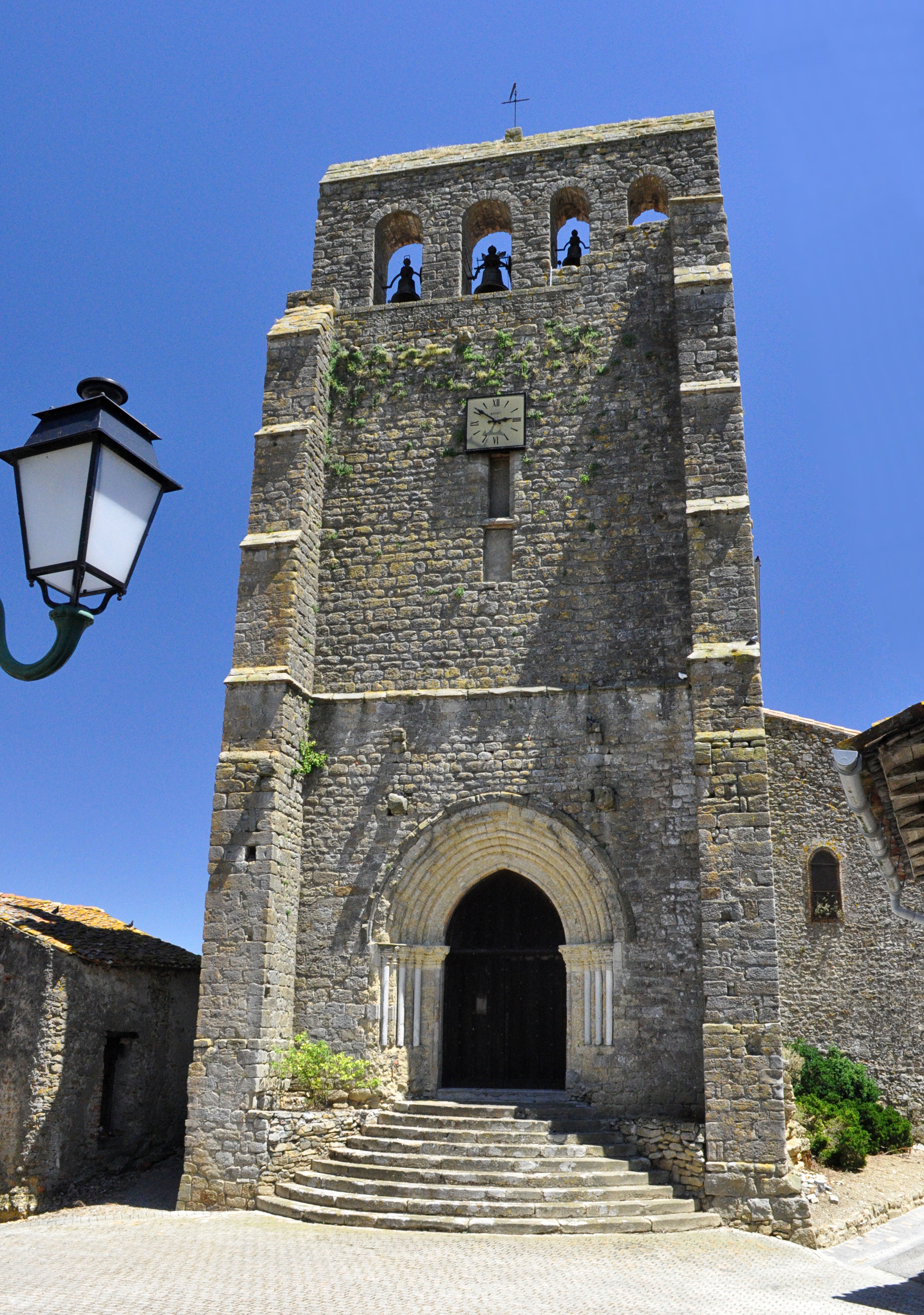 église Daint Jean-Baptiste de Lapenne (Ariège)